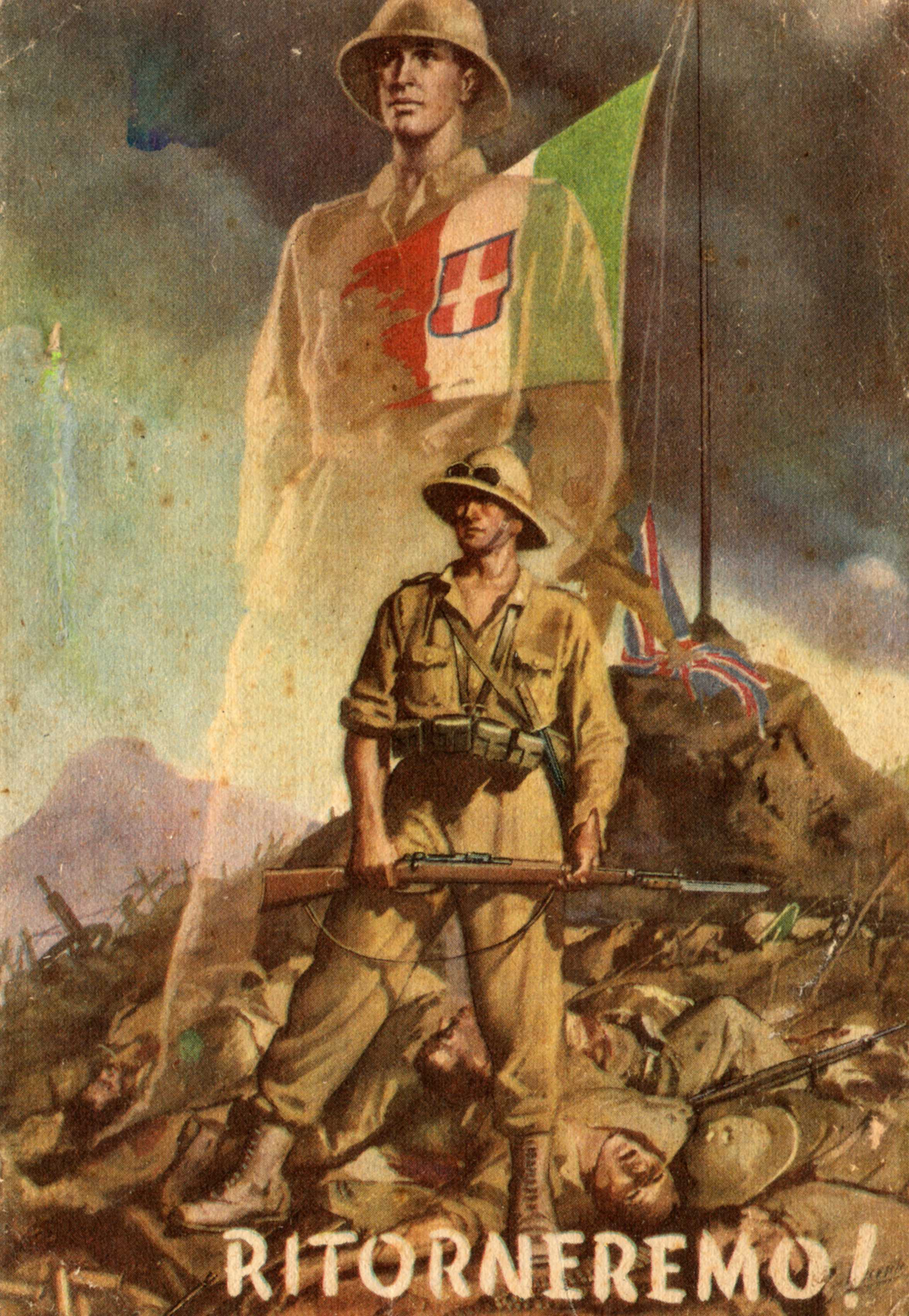 Amedeo di Savoia - Aosta (1898 - 1942)